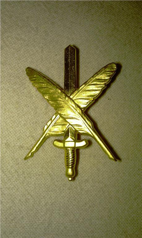 Tilläggstecken för PAO (Public Affairs Officers) inom den svenska Försvarsmakten.